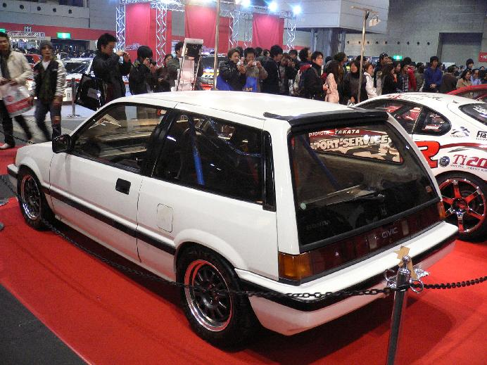 カーショーにて撮影